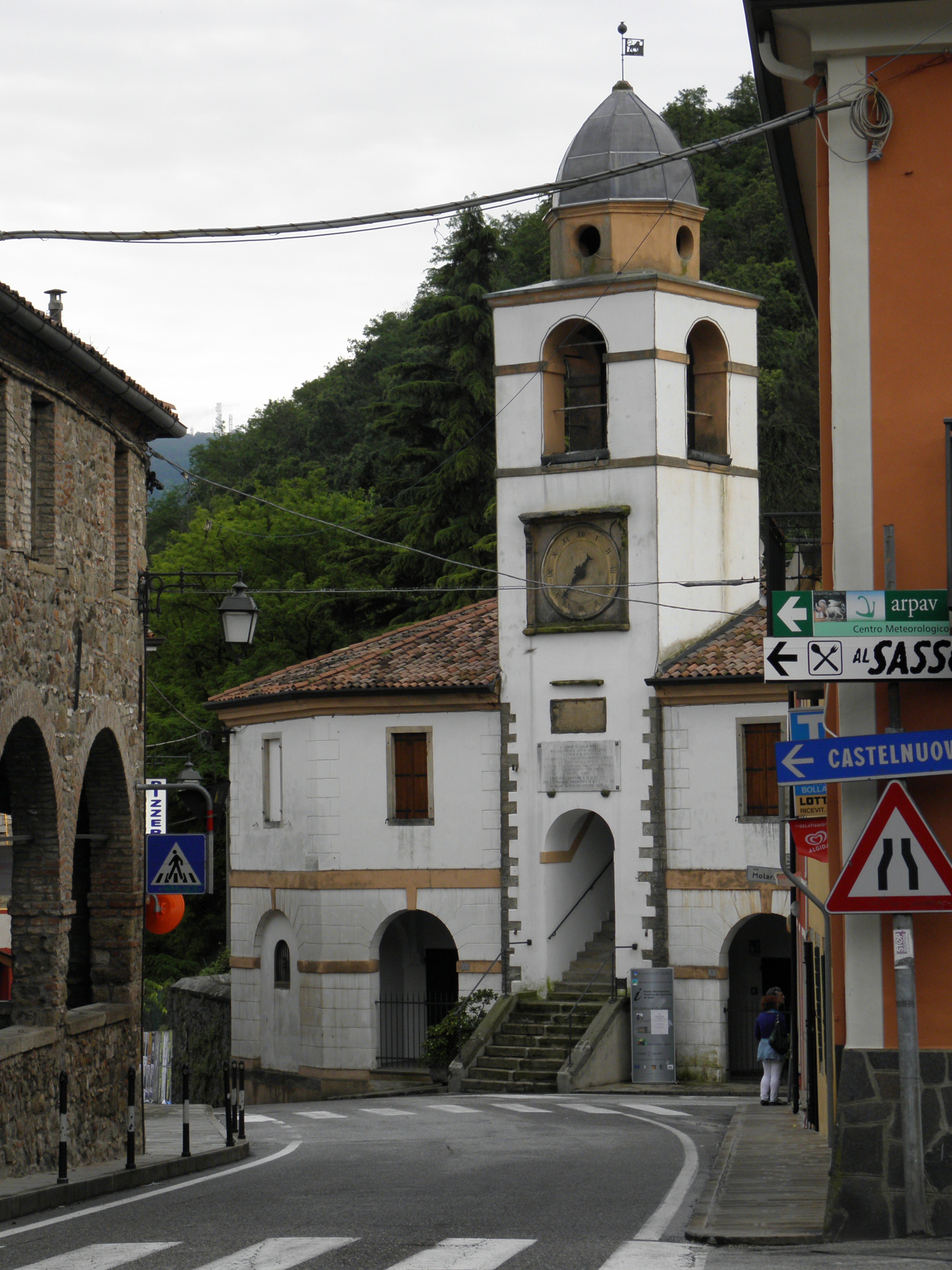 Teolo, il Palazzetto dei Vicari, sede del Museo di arte contemporanea Dino Formaggio.